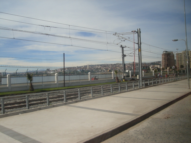 Imagen del trazado del Metro de Valparaíso en la ciudad homónima, tomada por Usuario:Der schöne Tod.